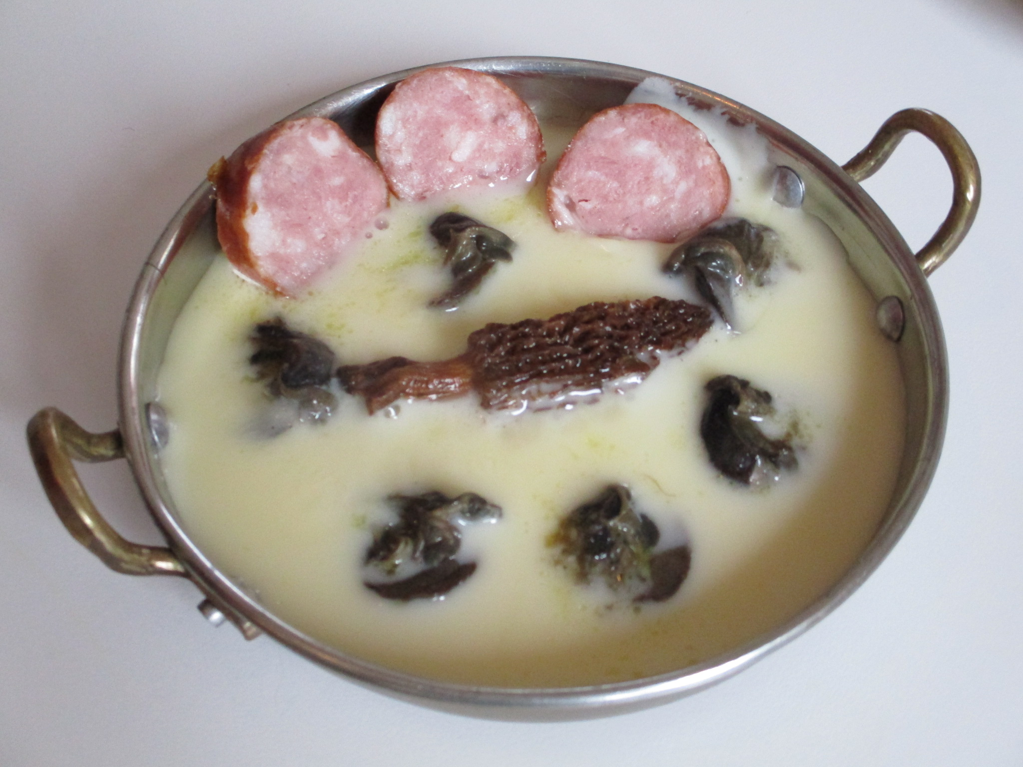 Escargot de Bourgogne à la franc-comtoise, avec cancoillotte, morilles, et saucisse de Morteau ou de Montbéliard